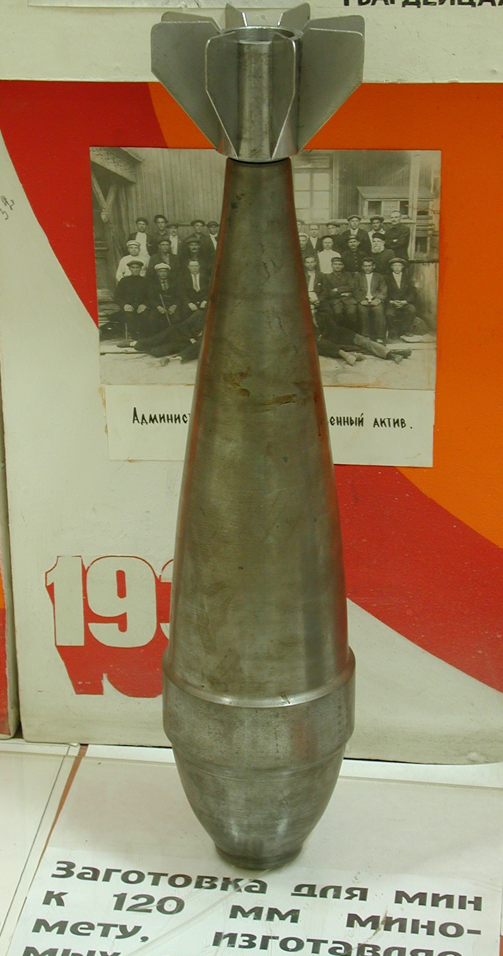 Заготовка для 120мм мины